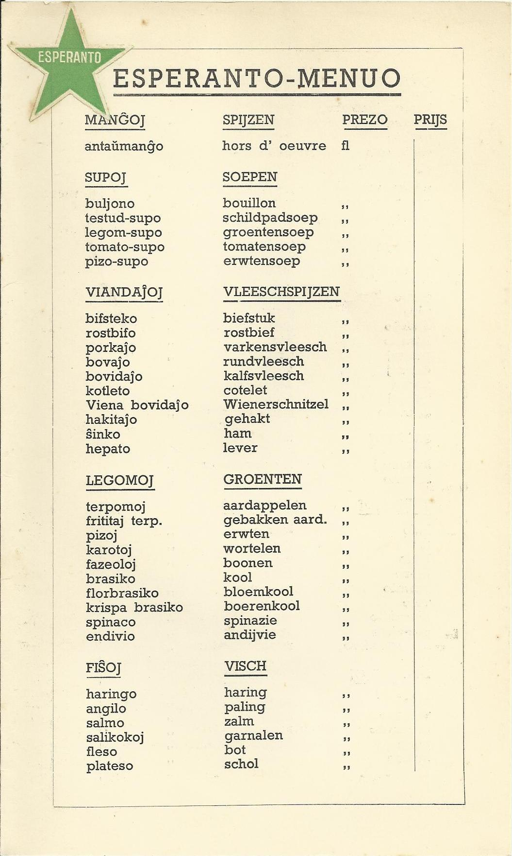 Dulingva manĝokarto, en Esperanto kaj la nederlanda (flanka rimarko: La karto devus esti pliaĝa ol 70 jaroj ĉar la ortografio de la vorto vleesch (viando) kaj visch (fiŝo) estas de antaŭ la jaro 1947)